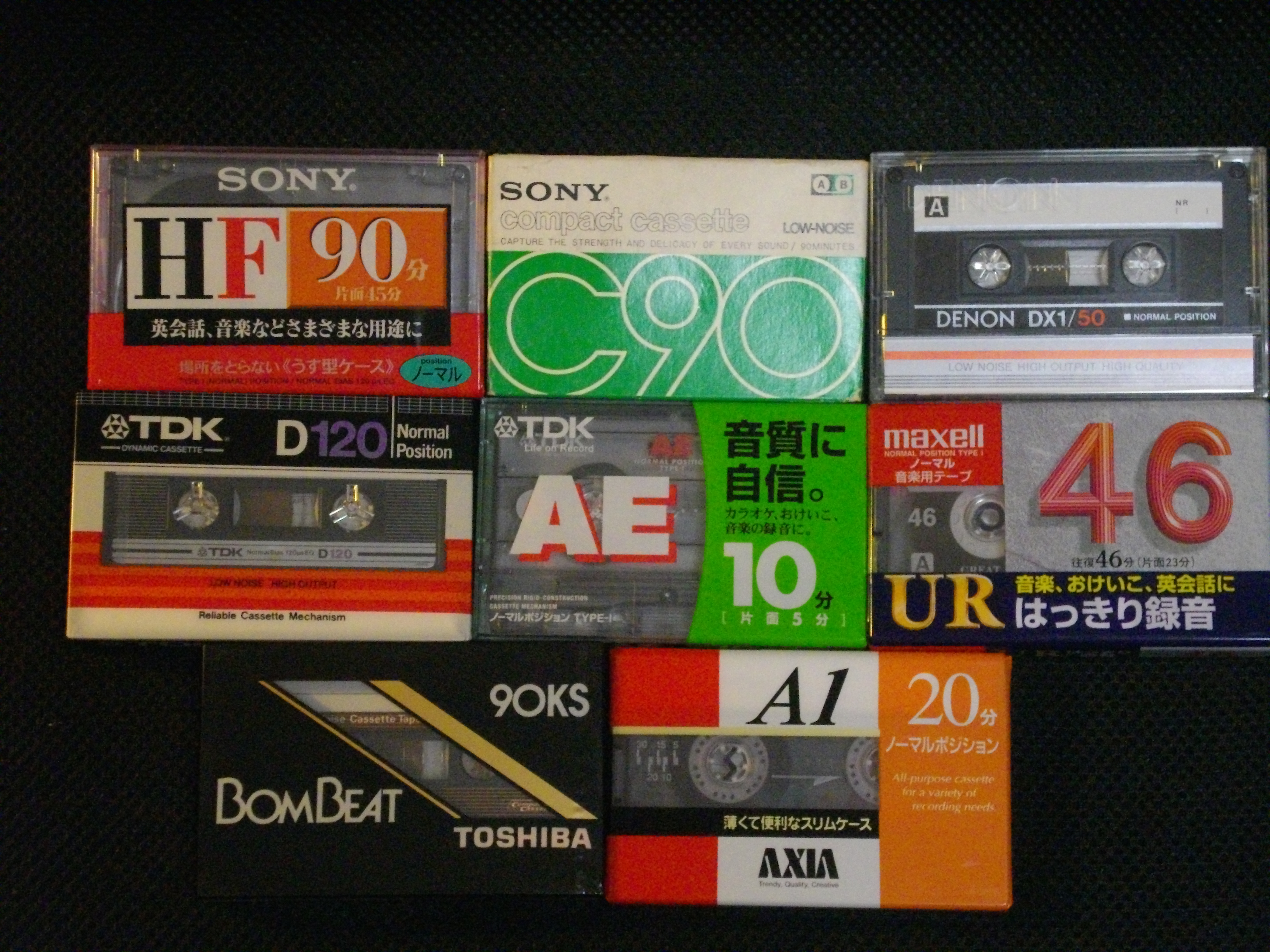 コンパクトカセット ノーマルポジションLNランク